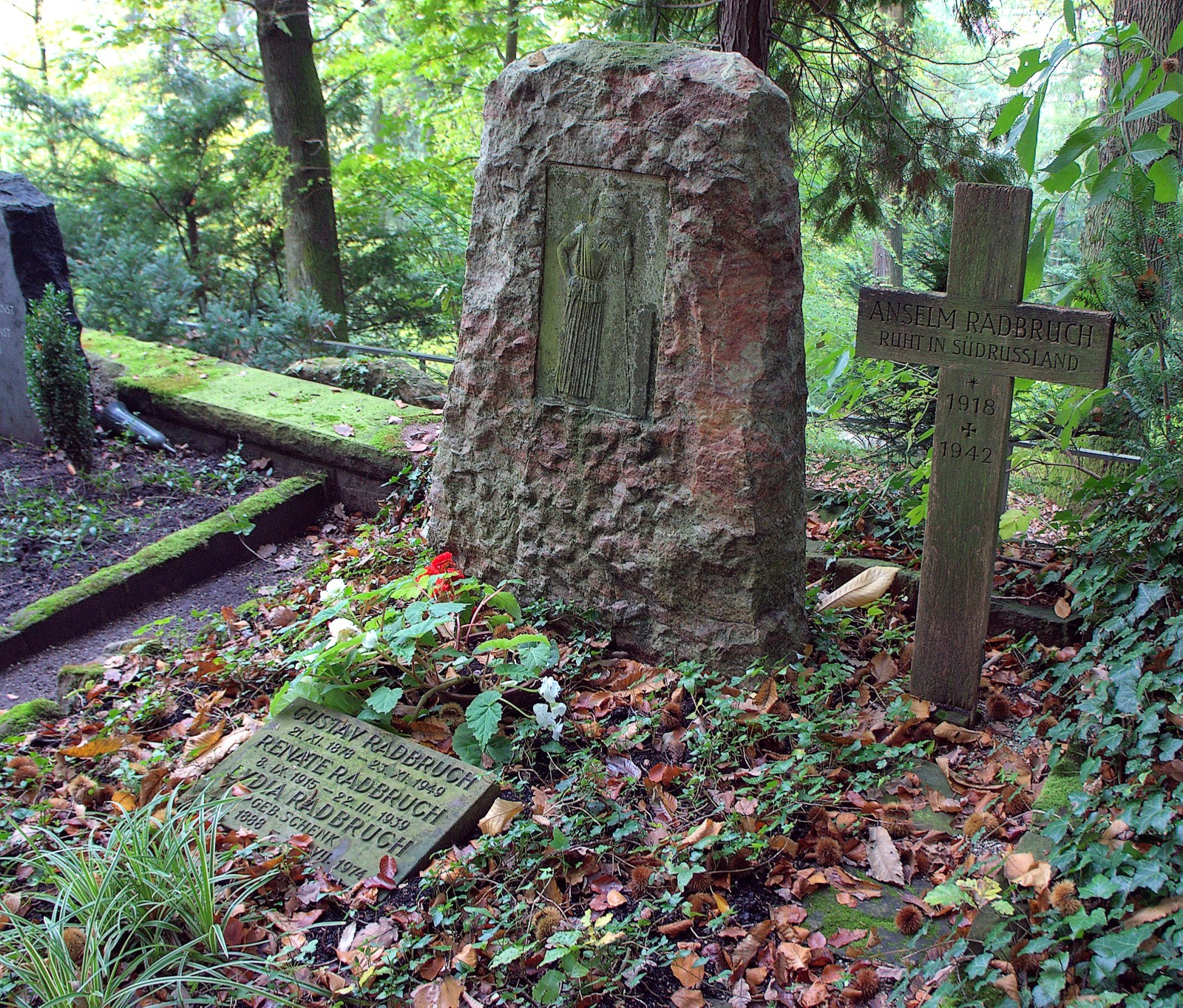 Grab Radbruch 2.Vers